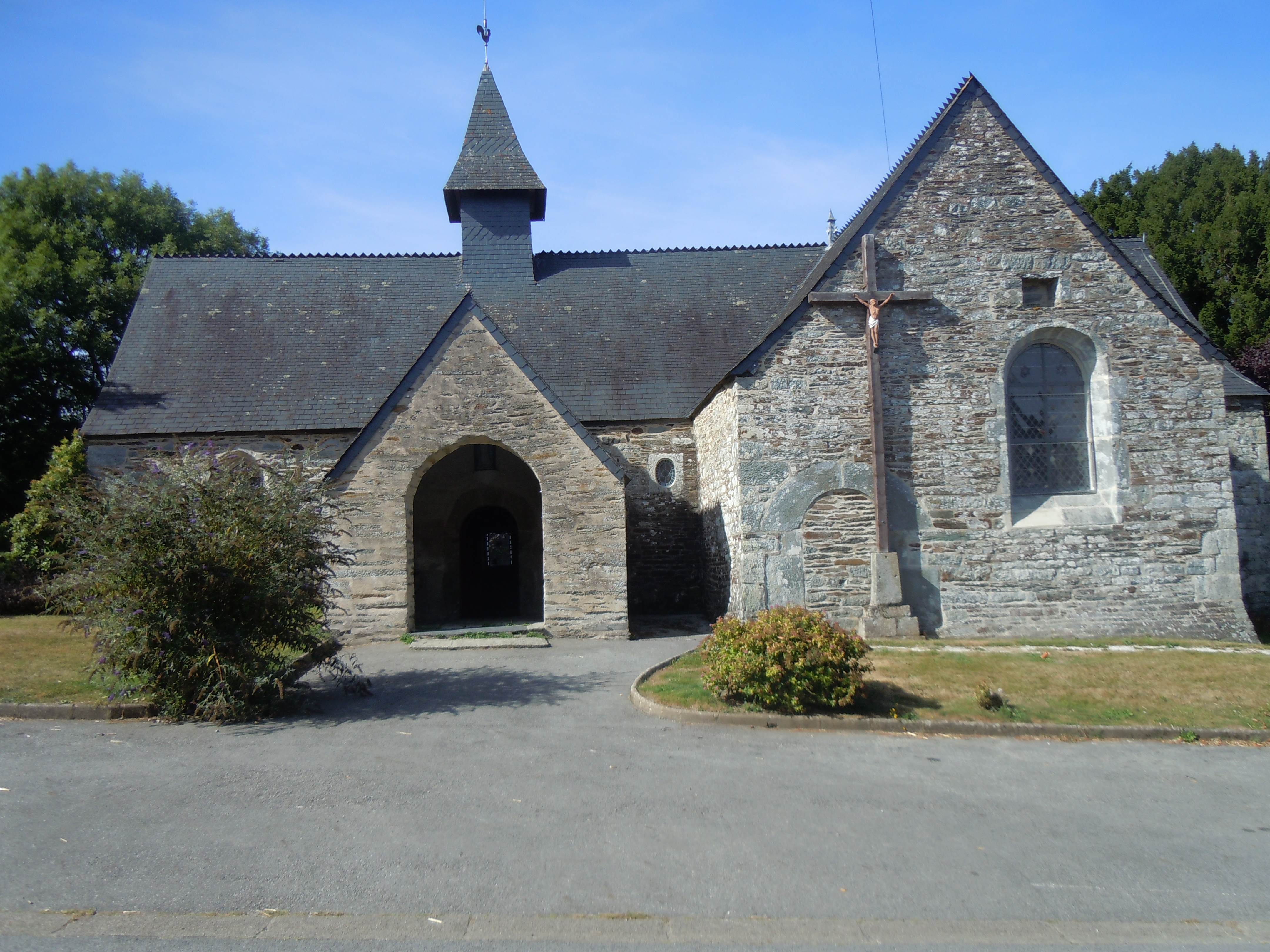 l'église paroissiale de Sainte-Brigitte (Morbihan). vue de la façade méridionale avec le porche .